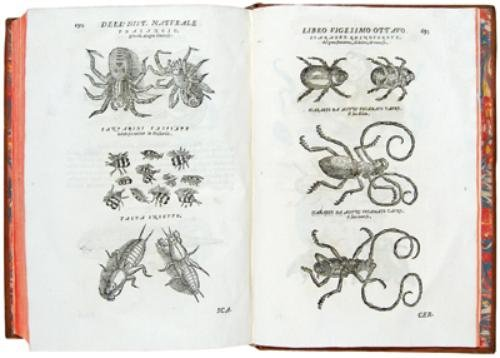 A obra de Guilherme Piso "De India utriusque re naturali et medica", de 1658, tida por segunda edição da Historia Naturalis Brasiliae.